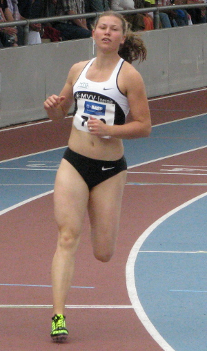 Anne Möllinger beim DLV WM-Testwettkampf 2011 im Stadion der MTG Mannheim.